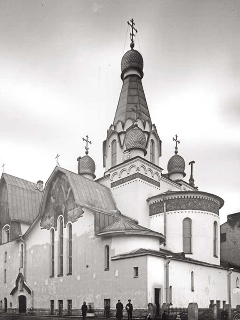 Православный Храм Святителя Петра Митрополита Московского на Роменской ул. д.12 в Санкт-Петербурге